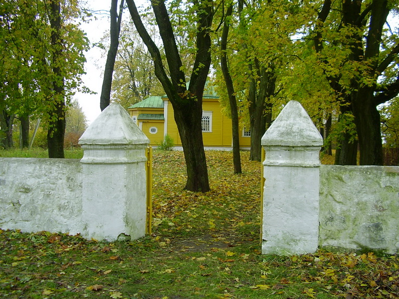 Дзяляцічы. Краявіды